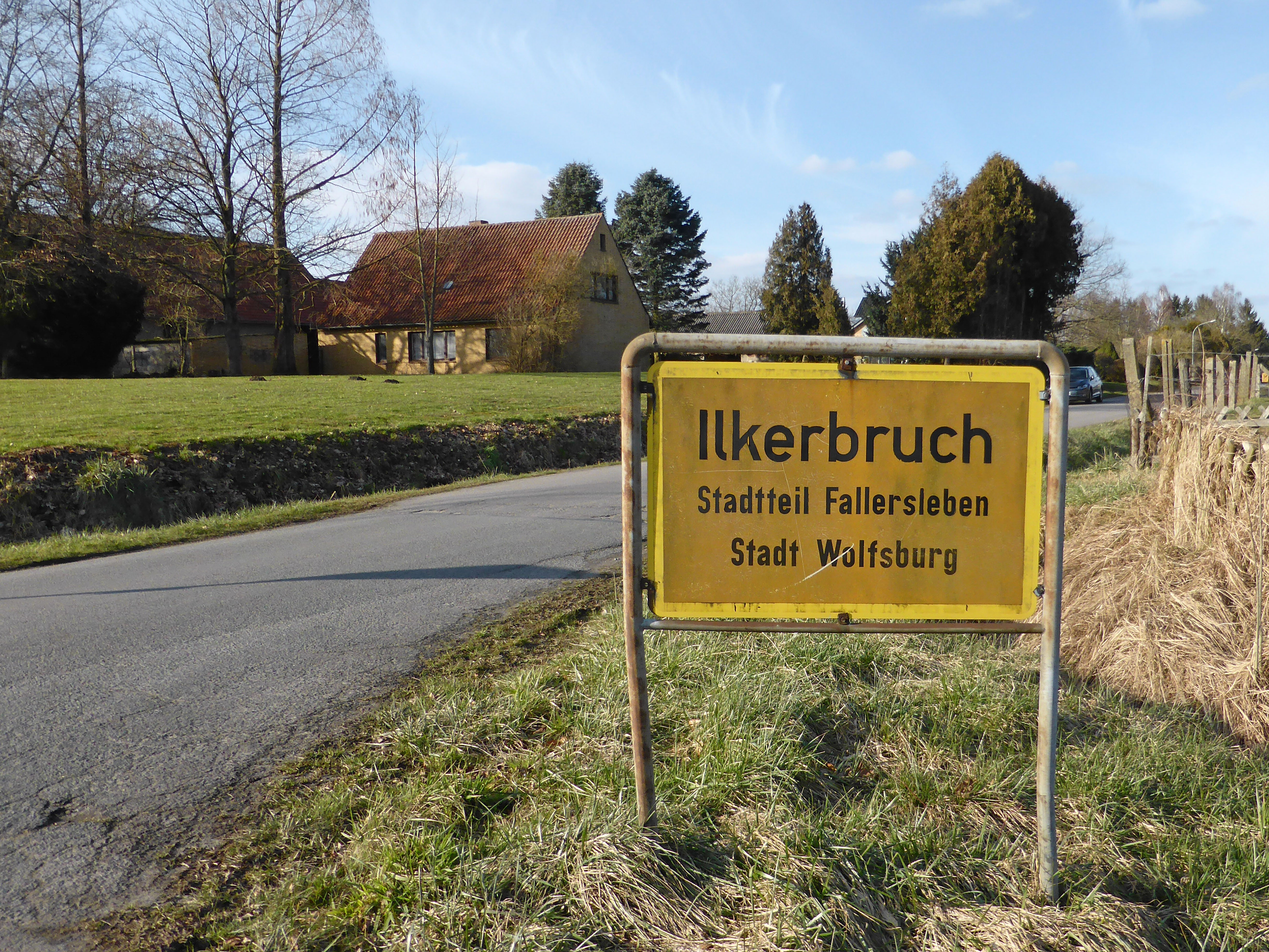 Ortseingang der Siedlung Ilkerbruch.